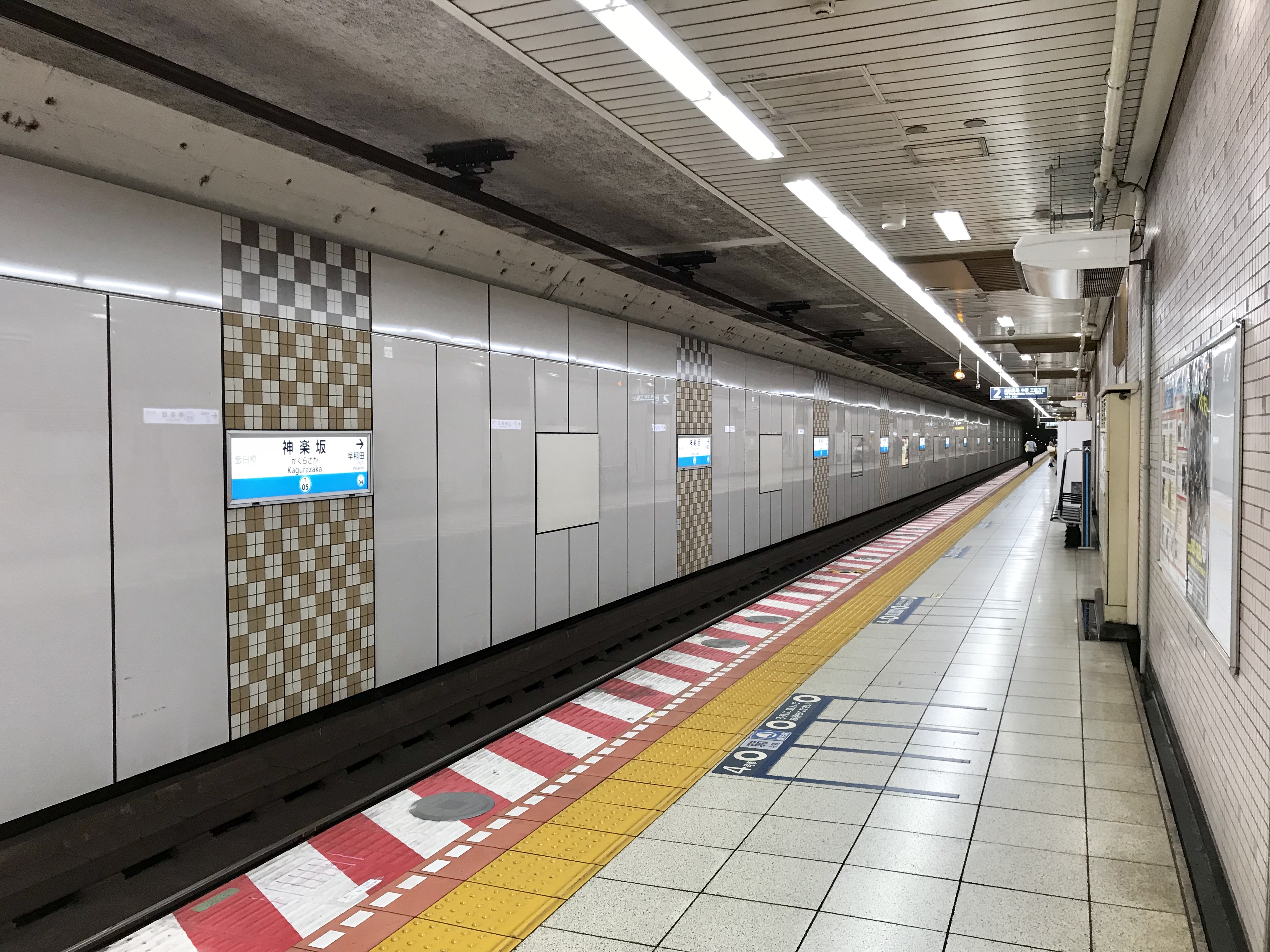 東京メトロ東西線神楽坂駅2番線ホーム（リニューアル後）